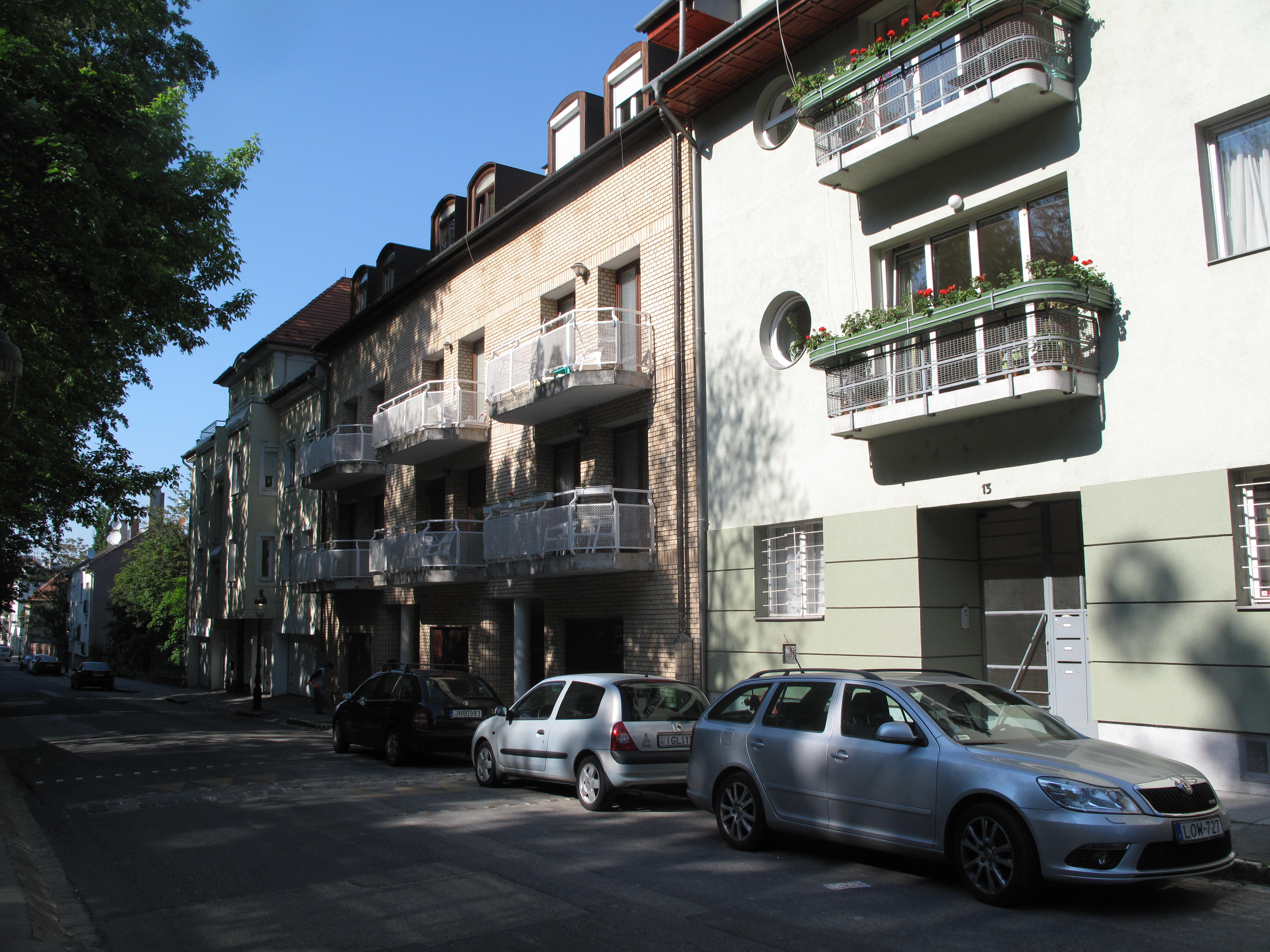 Budapešť